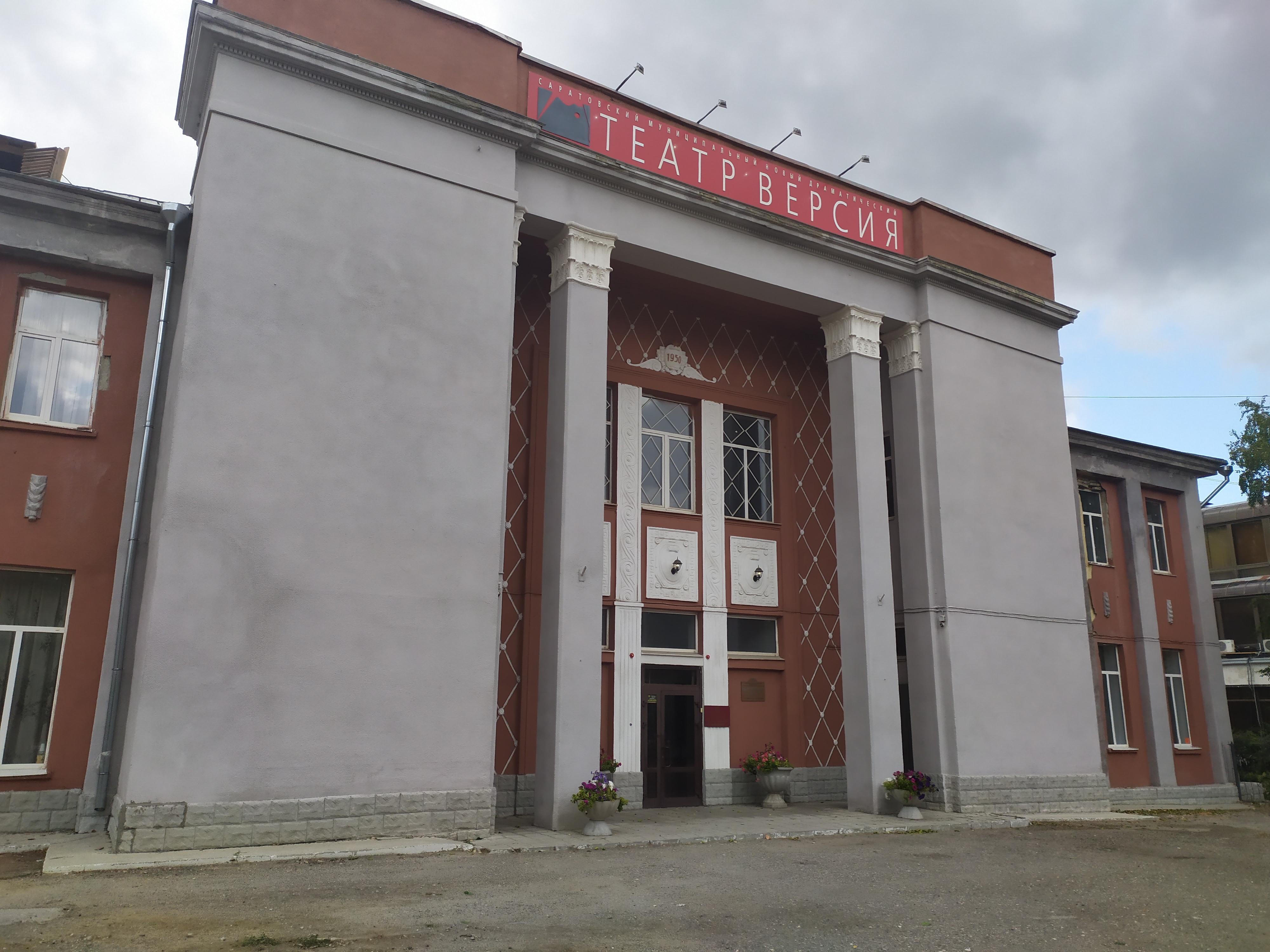 дмн